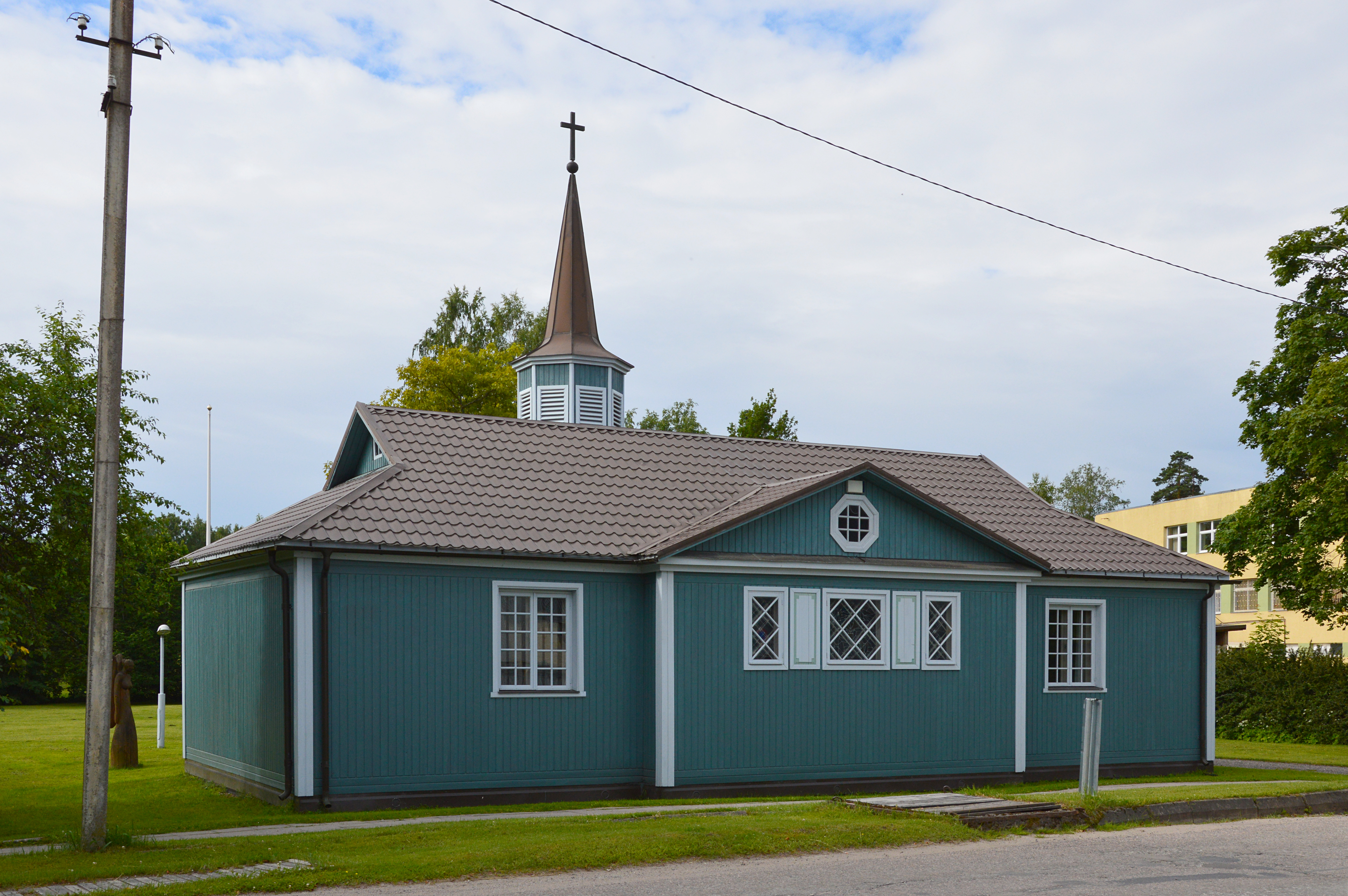 EELK Järvakandi Pauluse kirik